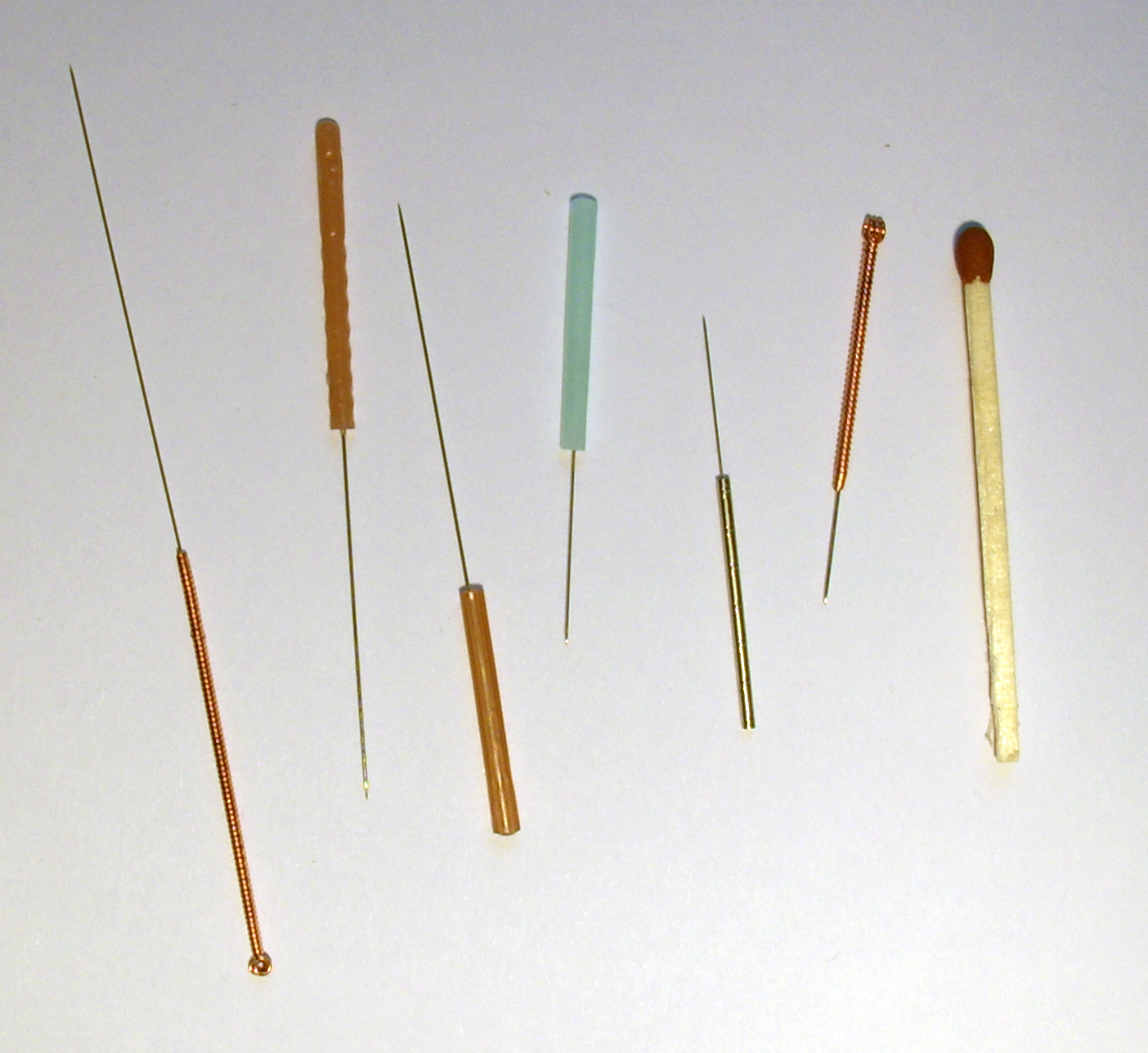 Akupunkturnadeln verschiedener Grösse